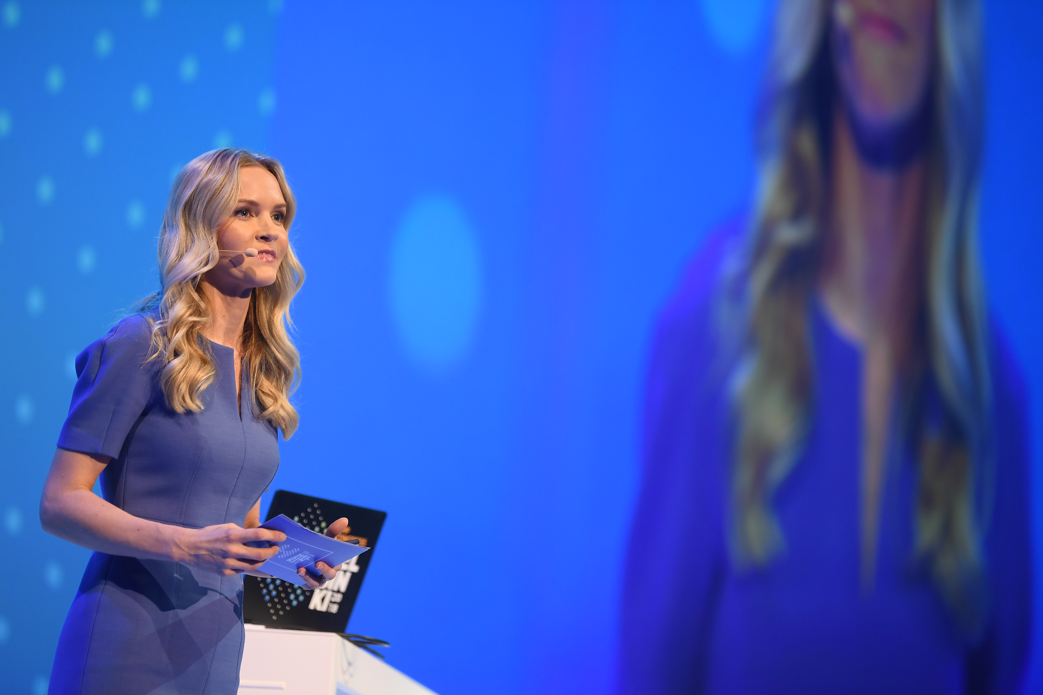 7 November 2018